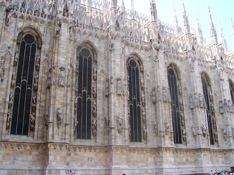 Milano - Fianco settentrionale del Duomo